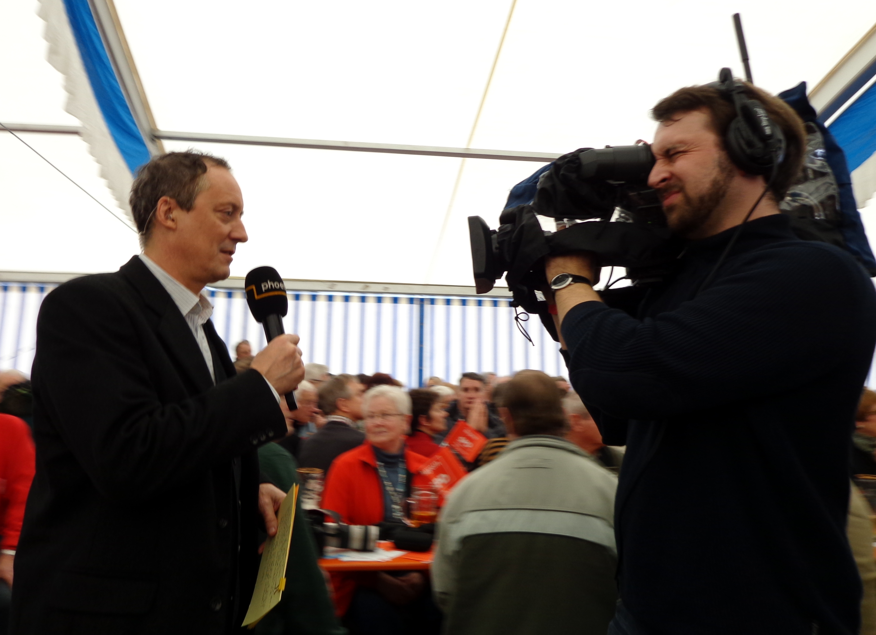 Michael Krons für Phoenix beim Politischen Aschermittwoch der SPD in Vilshofen an der Donau im Februar 2013.